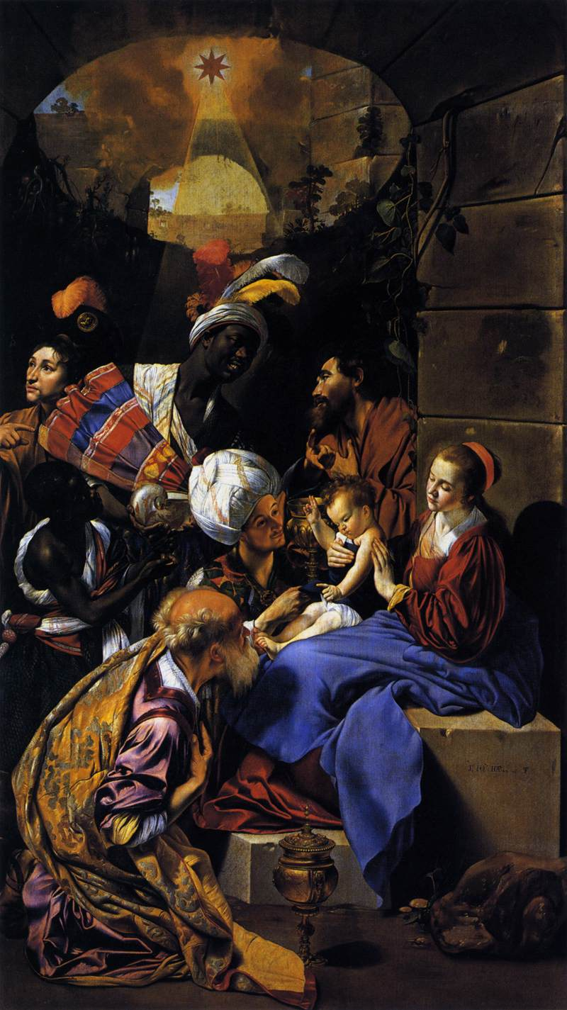 La obra representa el momento en que el Niño Jesús fue adorado por los tres reyes magos.